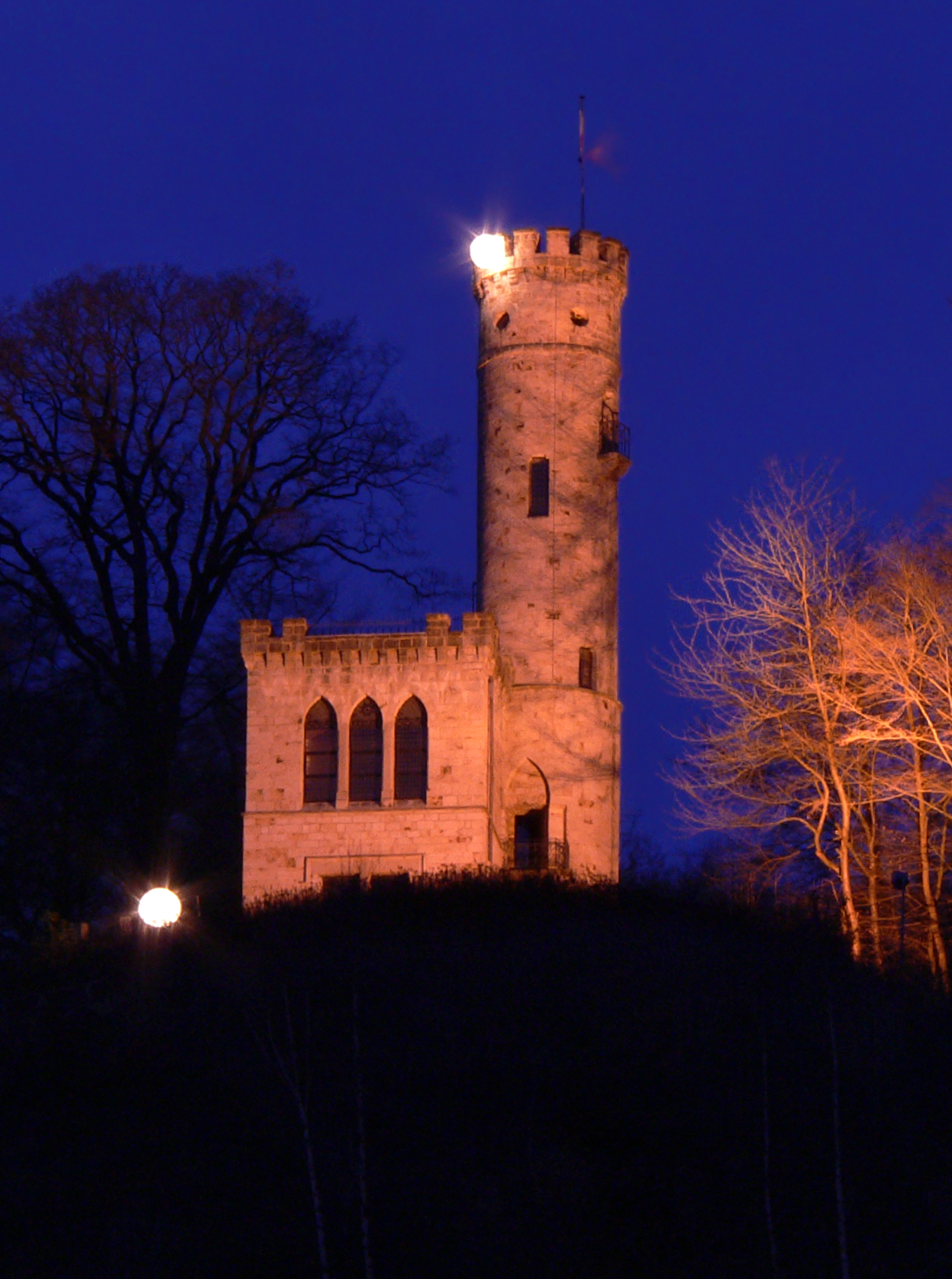 Tillyschanze (Münden)